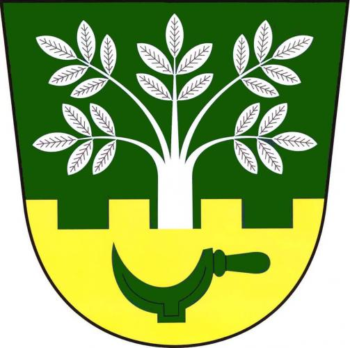 Ořechov (UH), znak. V zeleném štítě vyrůstá ze zlaté hradby s položeným zeleným vinařským nožem-kosířem stříbrný ořešák.